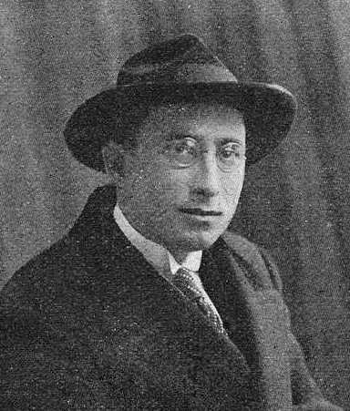 Victoriano Taibo, foto en Vida Gallega, 1919